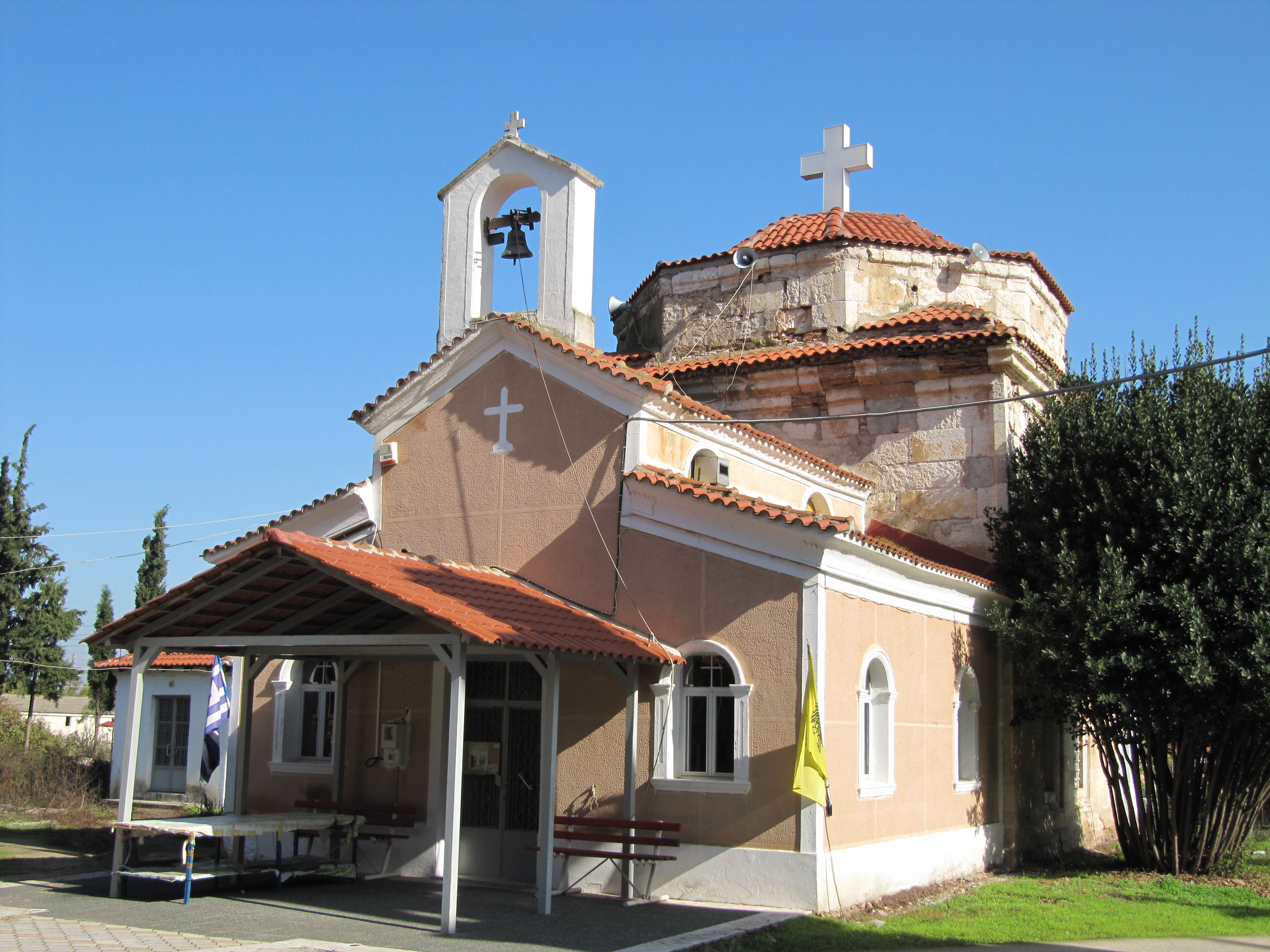 Μπαμπά Κιόι